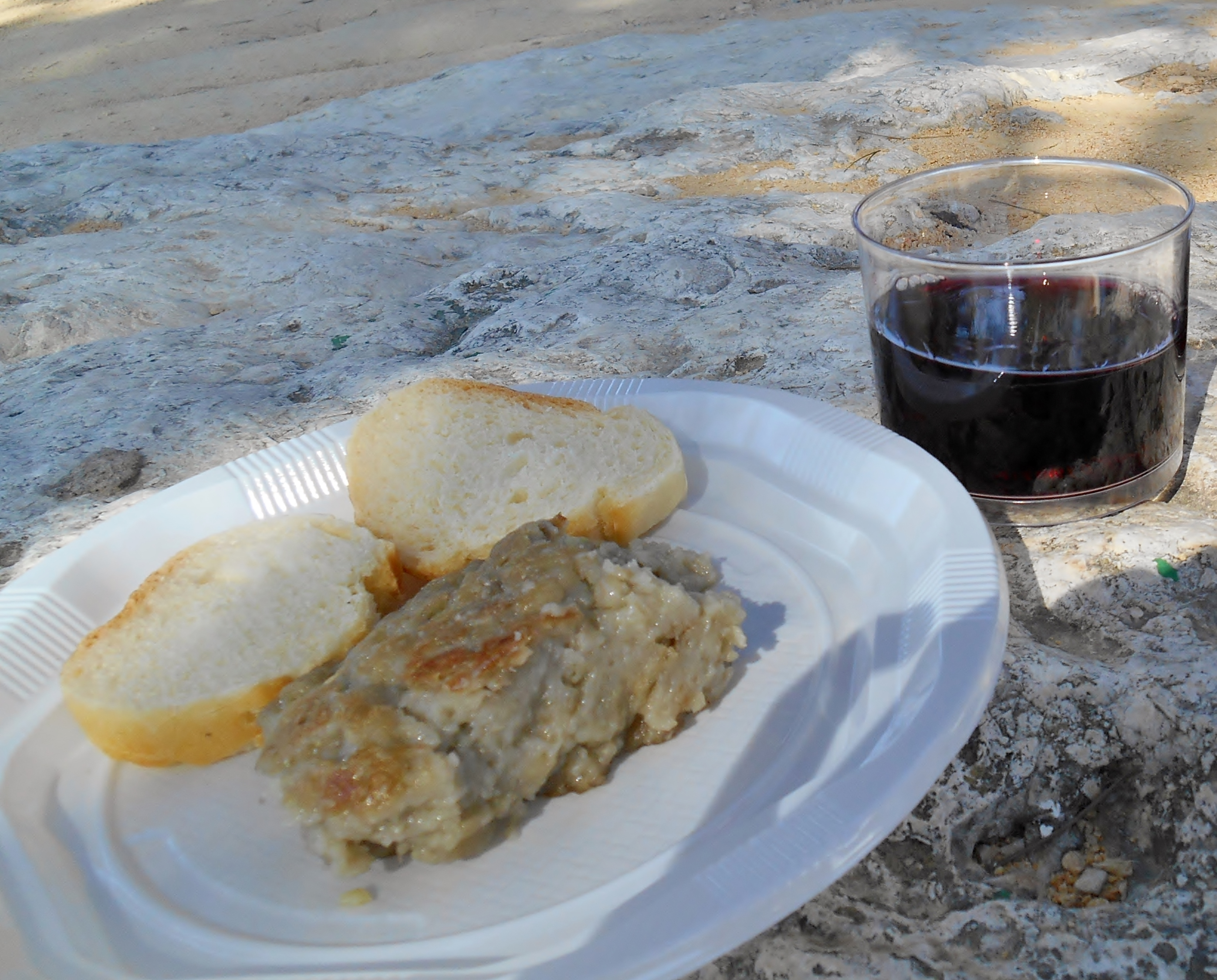 Mercado Medieval de Villena. Porción de gachamiga y chato de vino gachamiguero.